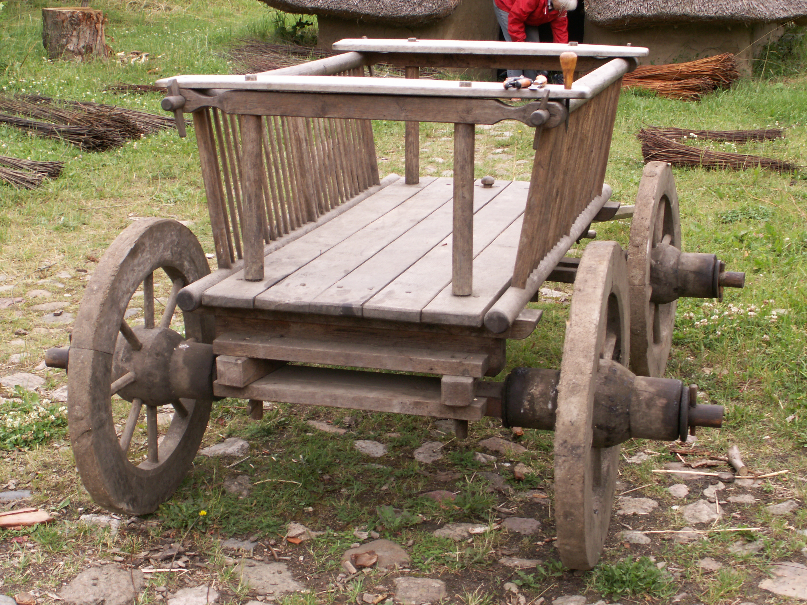 Wagen in Dänemark